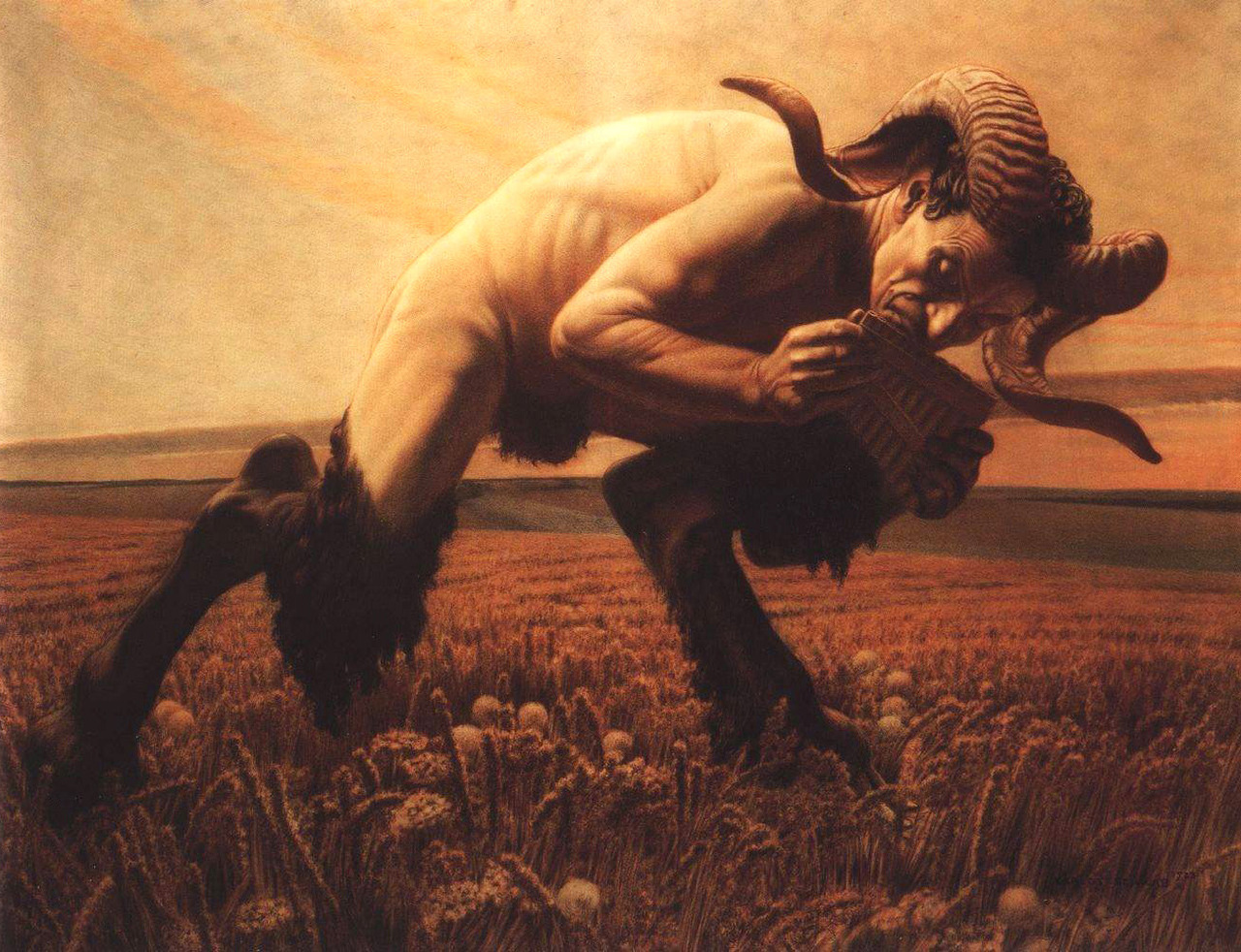 Le Faune de Carlos Schwabe, Cabinet d'arts graphiques des Musées d'art et d'histoire, Genève, Don Mme Carlos Schwabe.